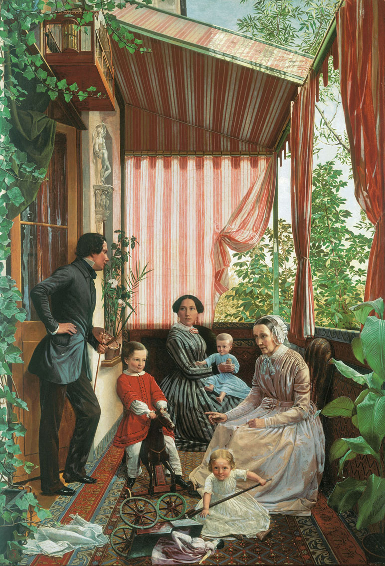 Family Picture (On The Balcony) Семейная картина (На балконе) Ф.М. Славянский — крепостной крестьянин помещика А.А. Семенского в деревне Вышково Вышневолоцкого уезда Тверской губернии. Около 1838 года стал учеником А.Г. Венецианова, организовавшего в своем имении Сафонкове художественную школу для юношей из неимущих классов. Стараниями Венецианова был выкуплен из крепостной зависимости. Посещал классы Академии художеств, в 1845 получил звание художника, в 1851 — „назначенного", в 1852 — академика портретной живописи. Был учителем рисования в Лесном и Межевом институтах и в женских гимназиях Петербурга. Изображены автор картины, его жена Александра Богдановна, мать жены и дети Кронид, Евгений и Лидия. За эту картину и за два портрета в 1851 году Славянский получил звание „назначенного".